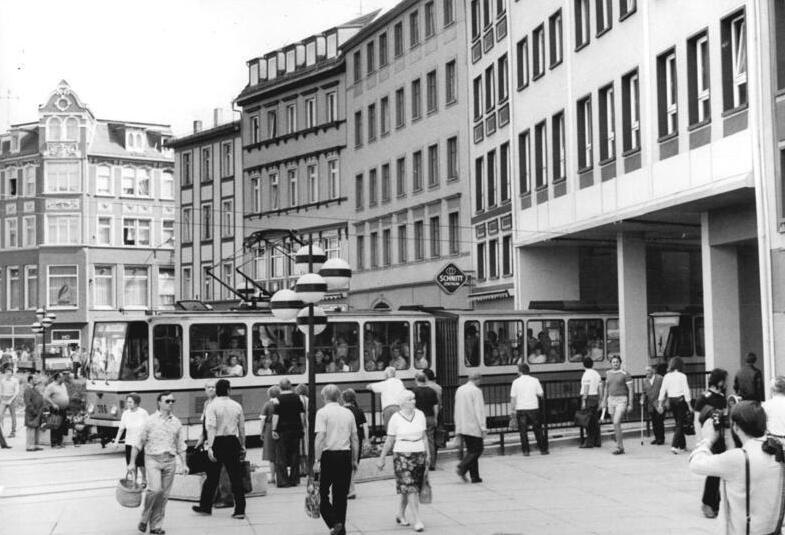 Gera, Johannisstraße, Straßenbahn ADN-ZB Kasper 5.6.84-eng. Gera: Rekonstruktion- Durch ein Haus fährt die Straßenbahn neuerdings in einem Teil der rekonstruierten Innenstadt Geras. Diese bisher in der DDR einmalige Verkehrslösung in der Geraer Johannisstraße wurde im Zusammenhang mit der Rekonstruktion und Modernisierung von Wohnhäusern zur günstigeren Gestaltung des öffentlichen Nahverkehrs gewählt. -siehe auch 0605-41N